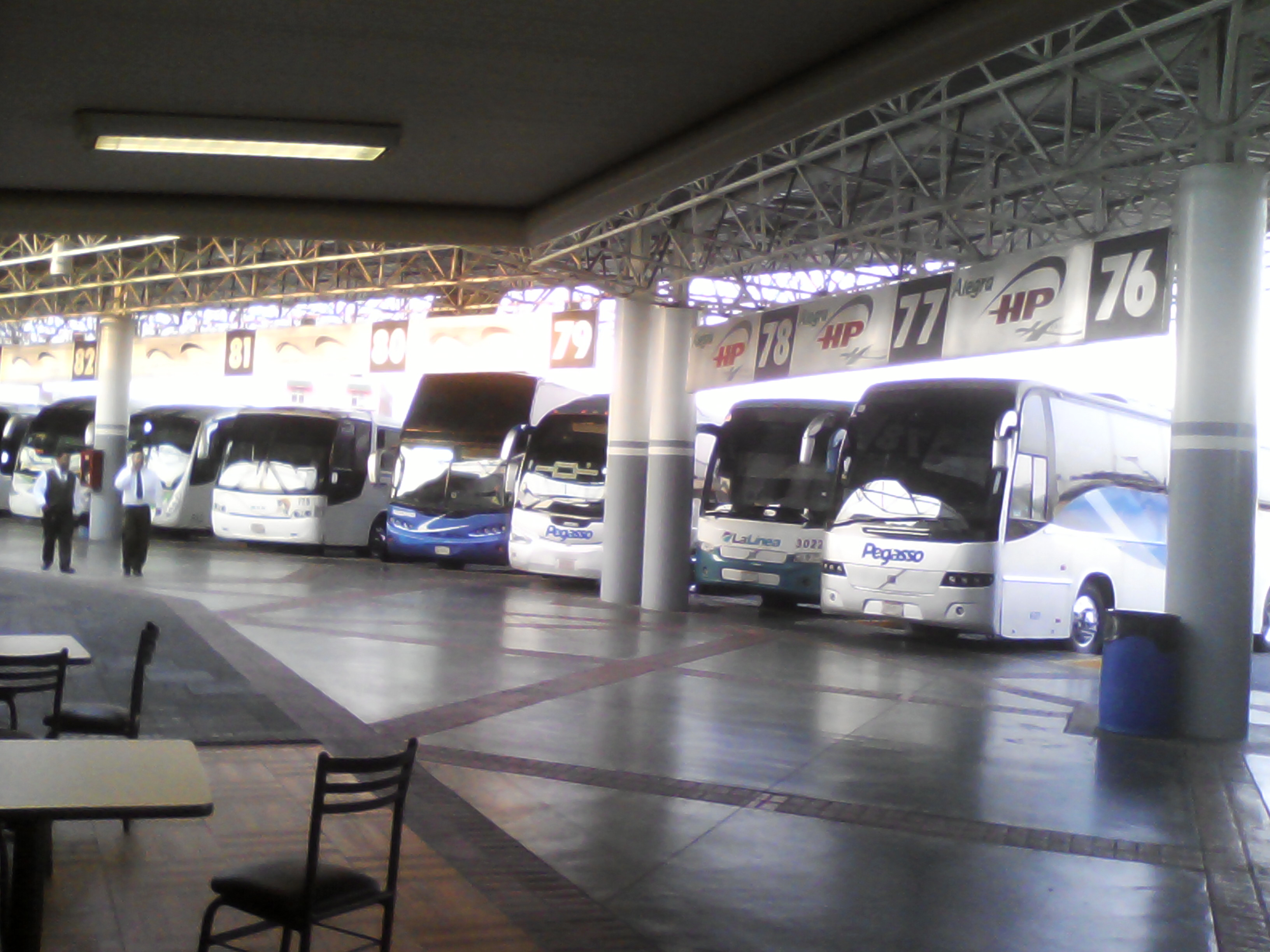 de la central de autobuses de Morelia